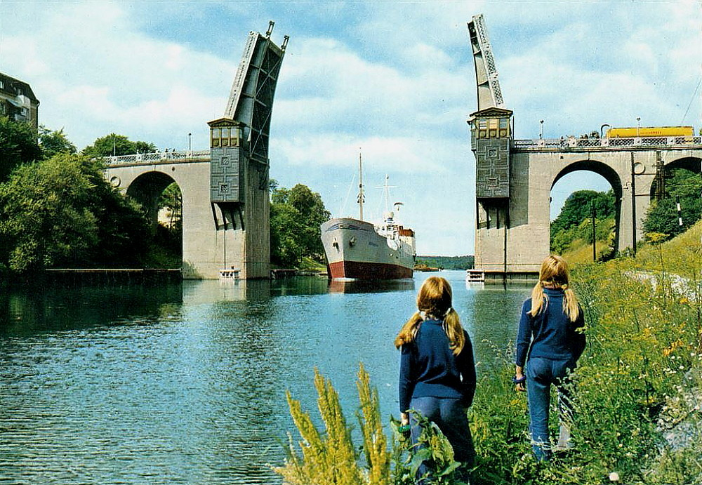 Landsvägsbron, kallad "Klaffbron" föregångaren till Mälarbron i Södertälje